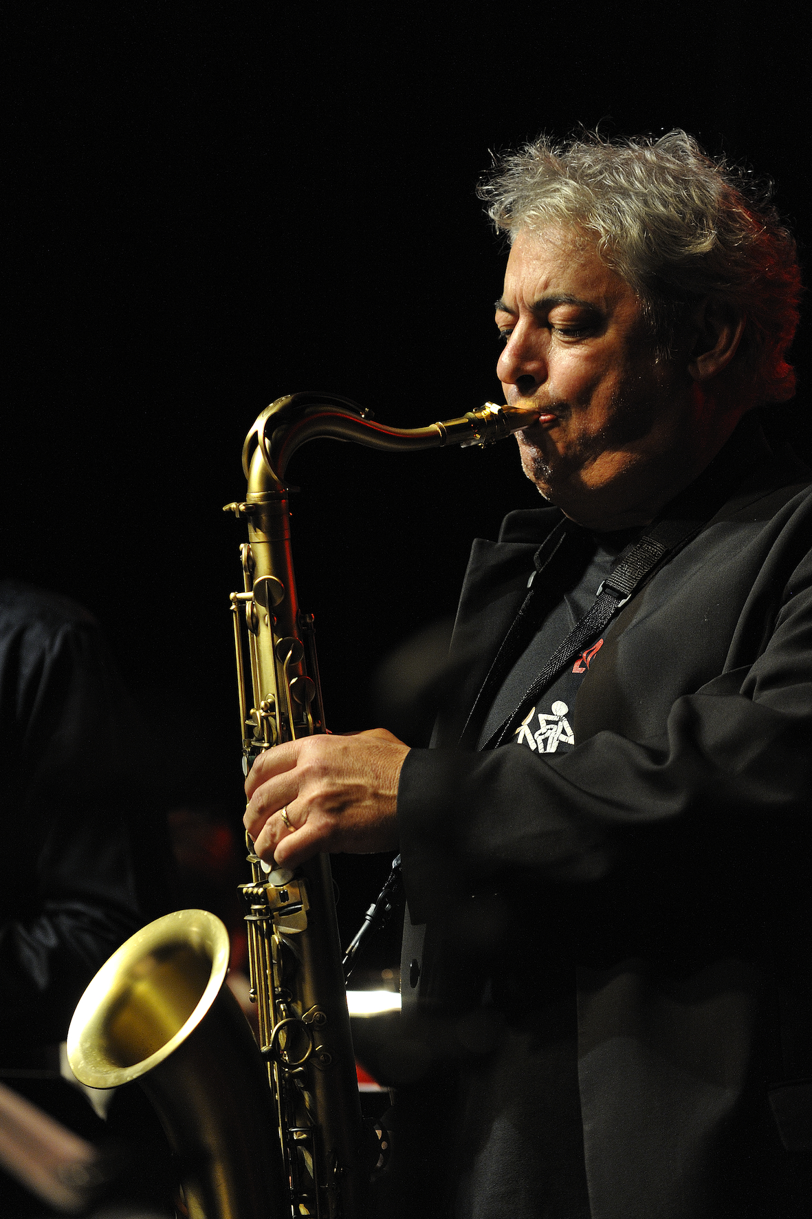 Portrait de Jean-Marc Padovani